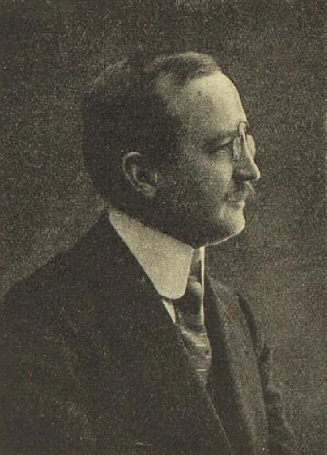 Karel Beneš (1881-1941), český malíř, kreslíř a pedagog